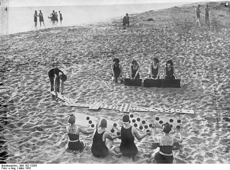 Der Strand ohne Sorgen ! Amerikanische Girls vergnügen sich am Strande Miamis beim Dominospiel.